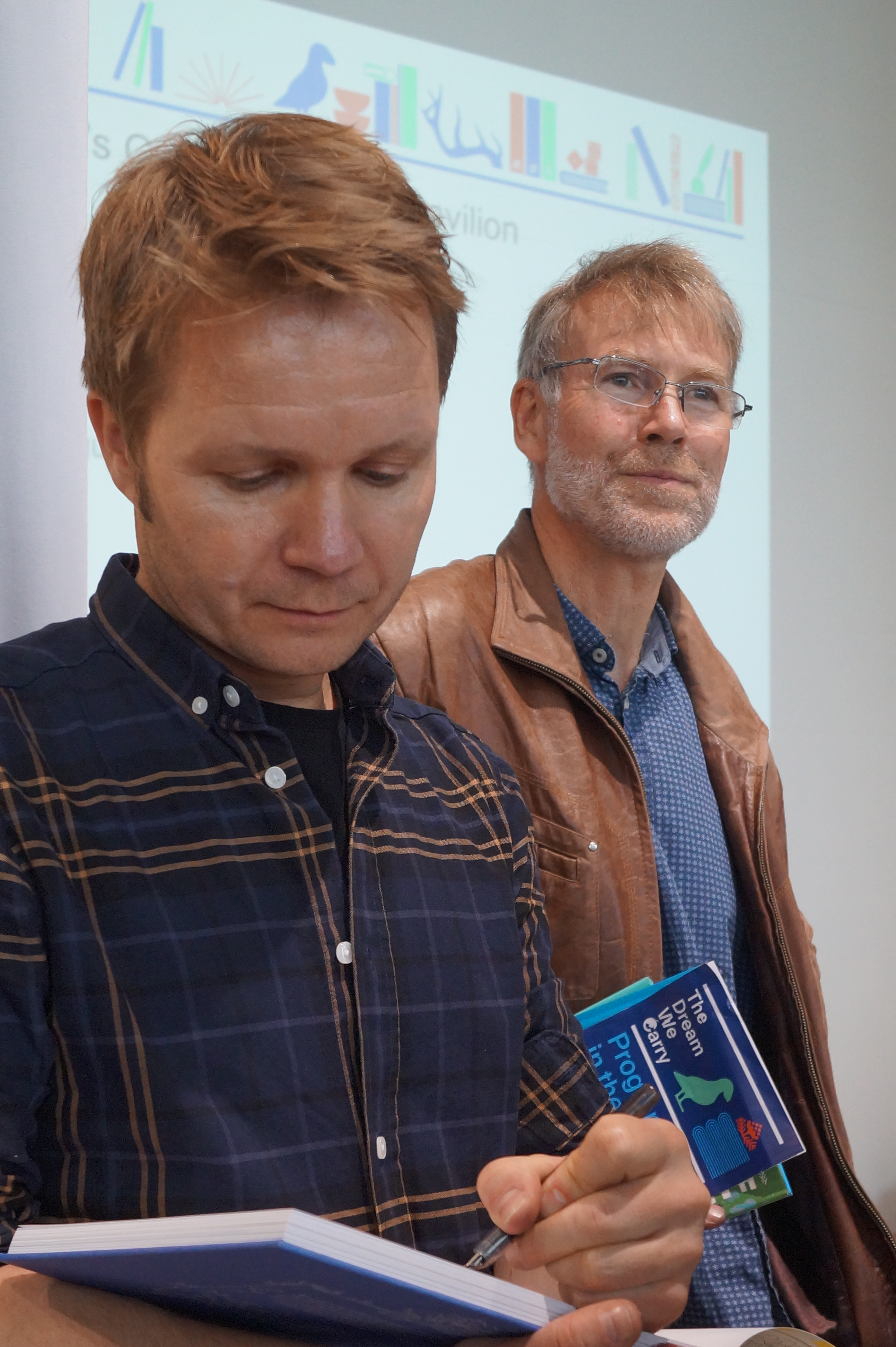 Øyvind Toseter, BjørnOusland, David Boller und Joscha Sauer mit Wolle Strzyz auf der Frankfurter Buchmesse 2019